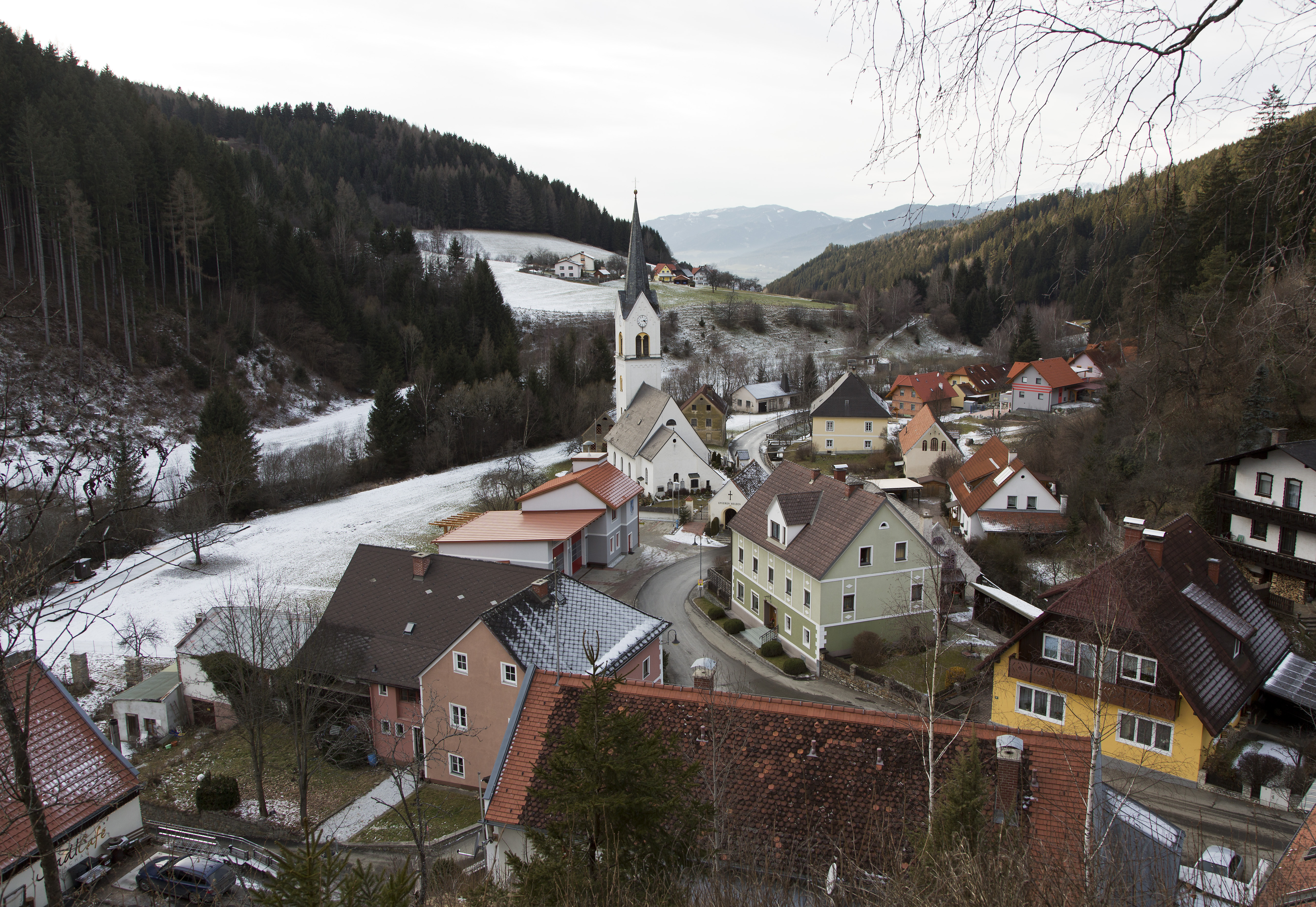 Der Ort Rachau bei Knittelfeld von Osten